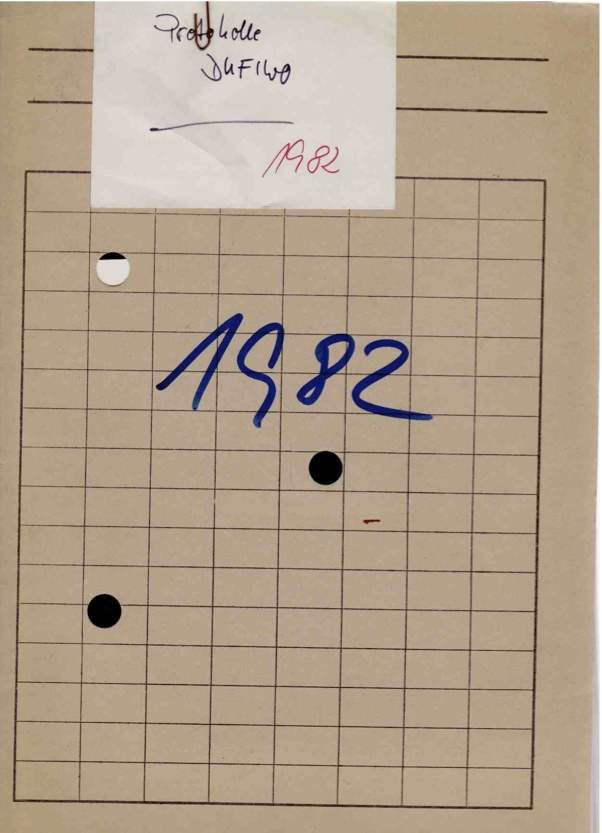 Deckblatt „Duisburger Protokolle“, 1982